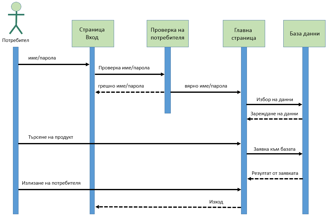 Примерна диаграма на последователностите